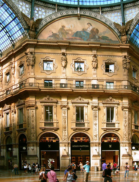 Interno della Galleria Vittorio Emanuele di Milano.